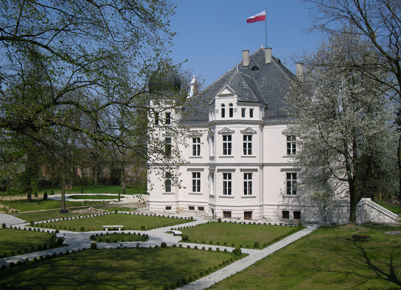 Pałac wiosną. Widok na południową elewację.